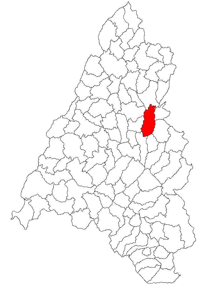 Categorie:Hărţi ale judeţului Bihor